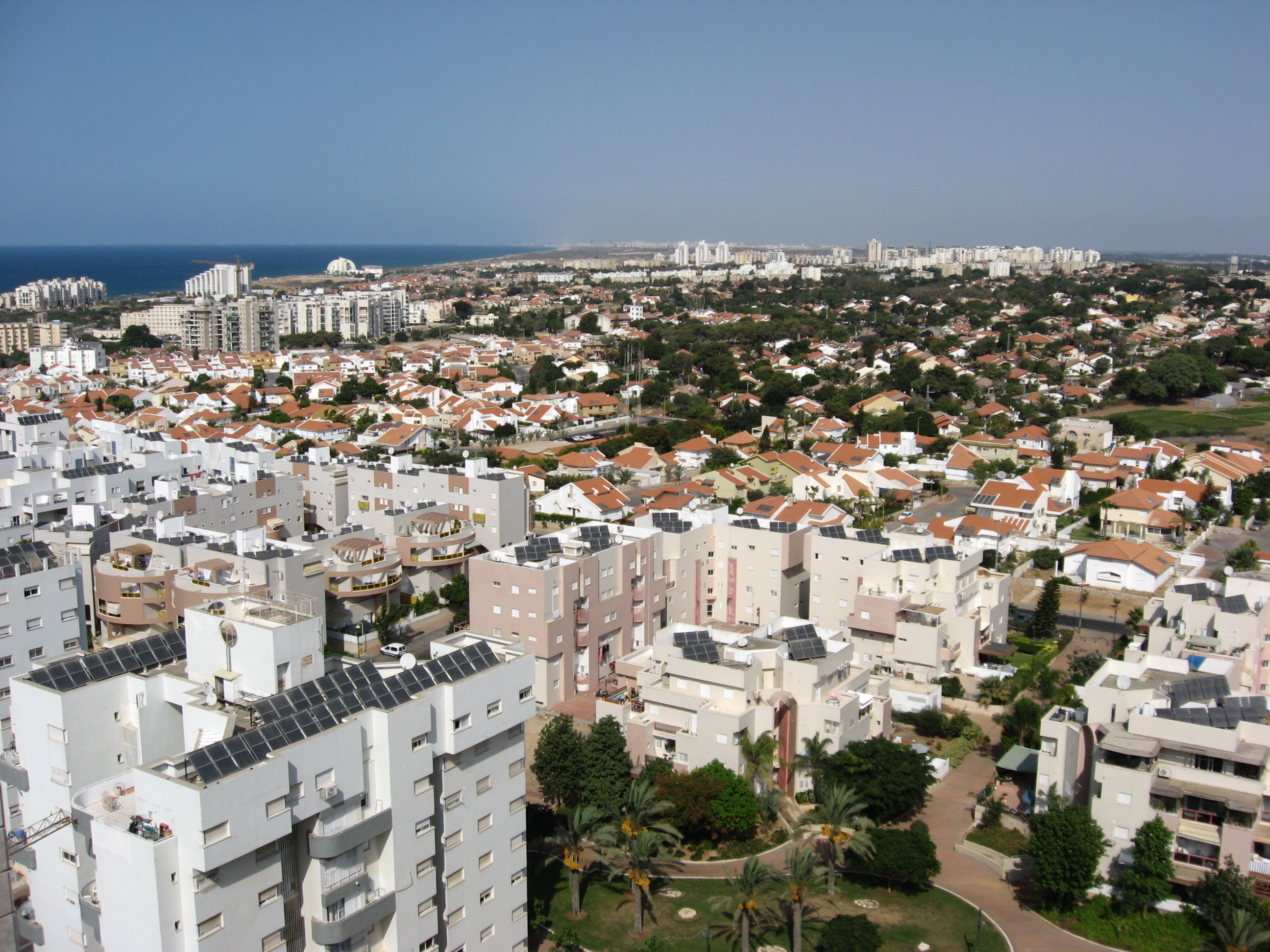 אשקלון מדרום לצפון: סיטי, אשכולי פז, אפרידר וברנע. באופק ניתן לראות את אשדוד.